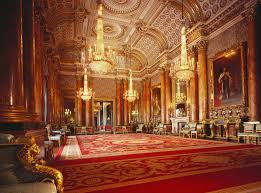 A palota.